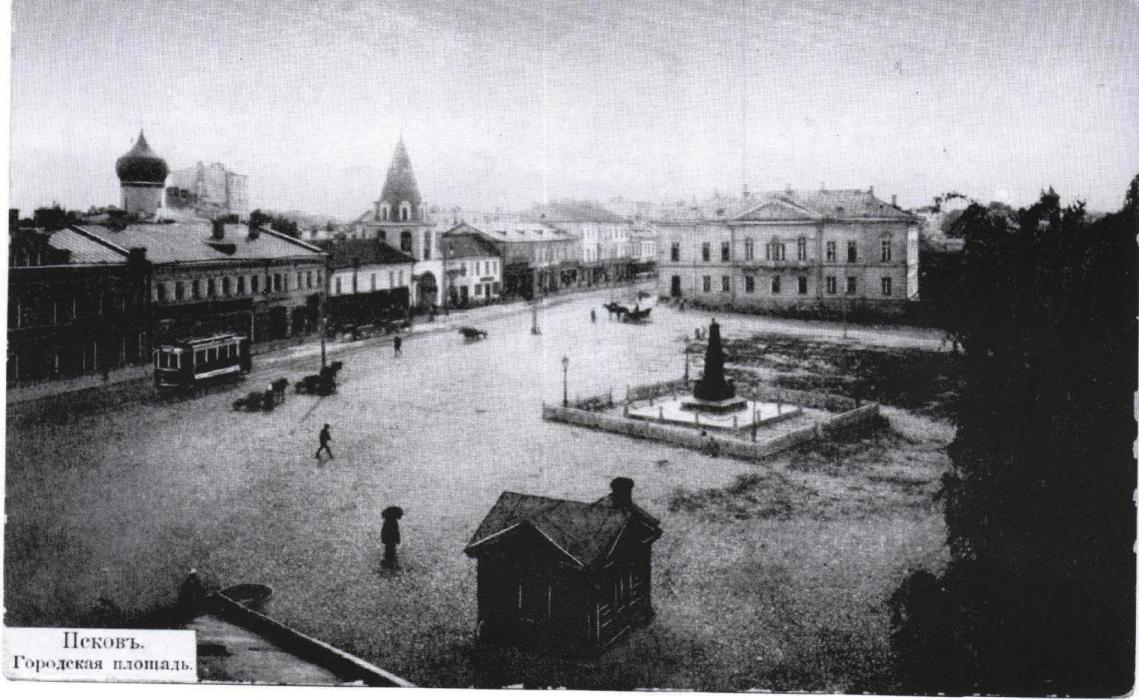 Дореволюционная открытка, на которой изображён памятник Императору Александру II Освободителю